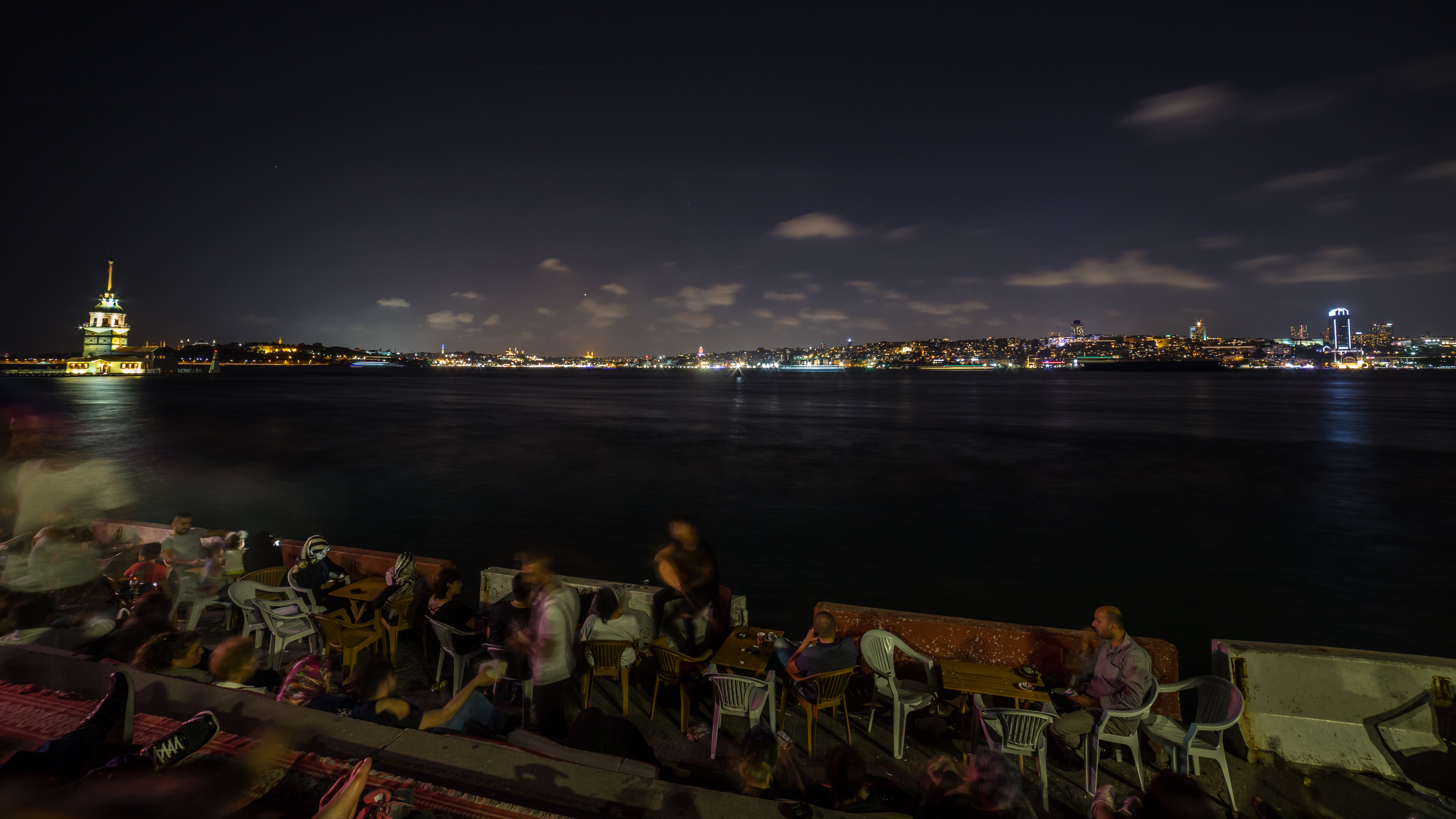 panorama